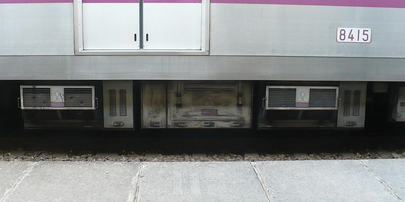 地下鉄8000系のチョッパ装置